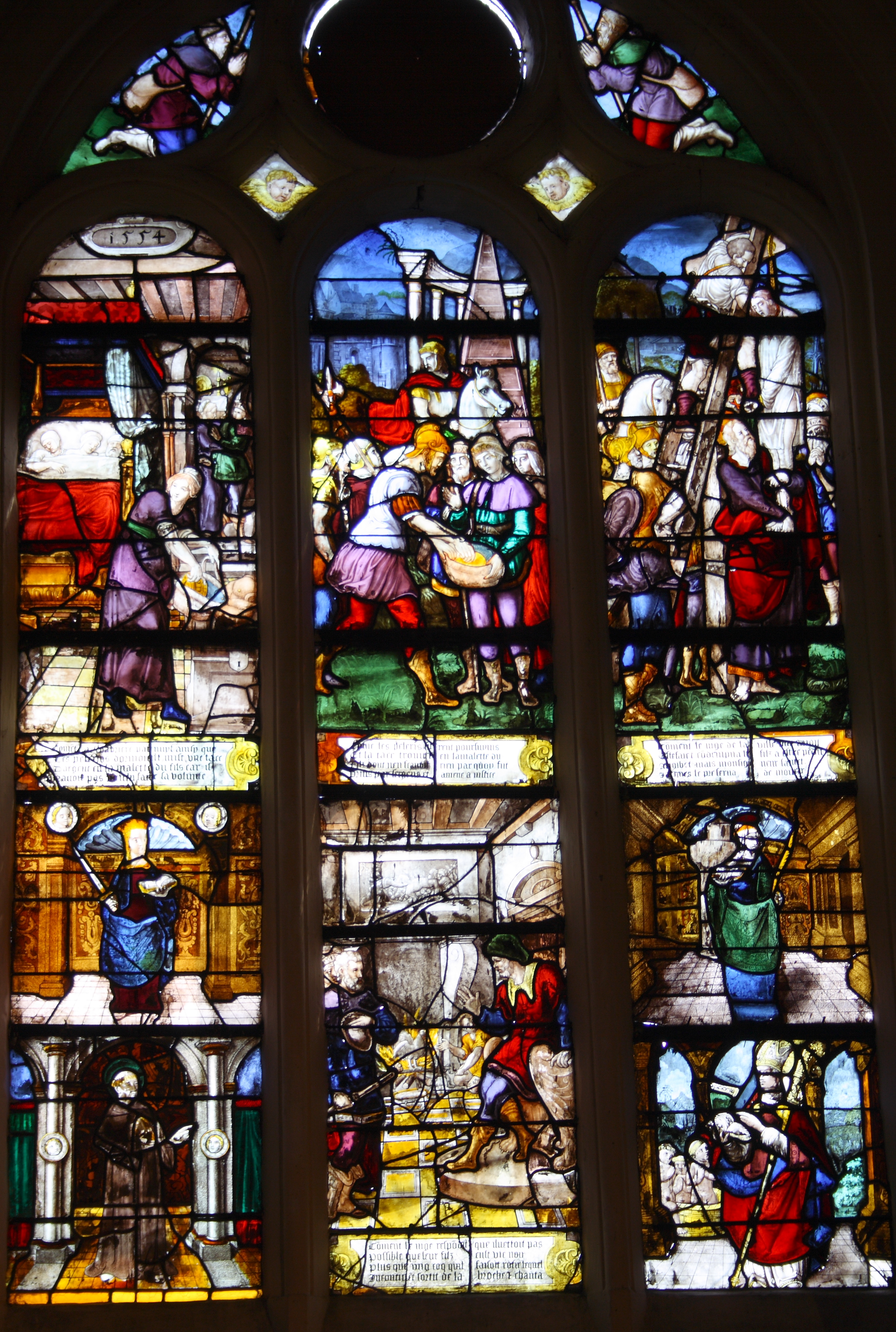 Katholische Pfarrkirche Saint-Martin in Triel-sur-Seine, einer Gemeinde im Département Yvelines (Île-de-France), Bleiglasfenster aus dem 16. Jahrhunderts, Darstellung: Hühnerwunder; unten rechts: Legende des hl. Nikolaus